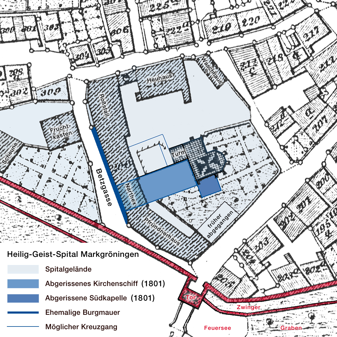 Spitalkomplex um 1830 – 1801 abgerissene Teile sind rekonstruiert